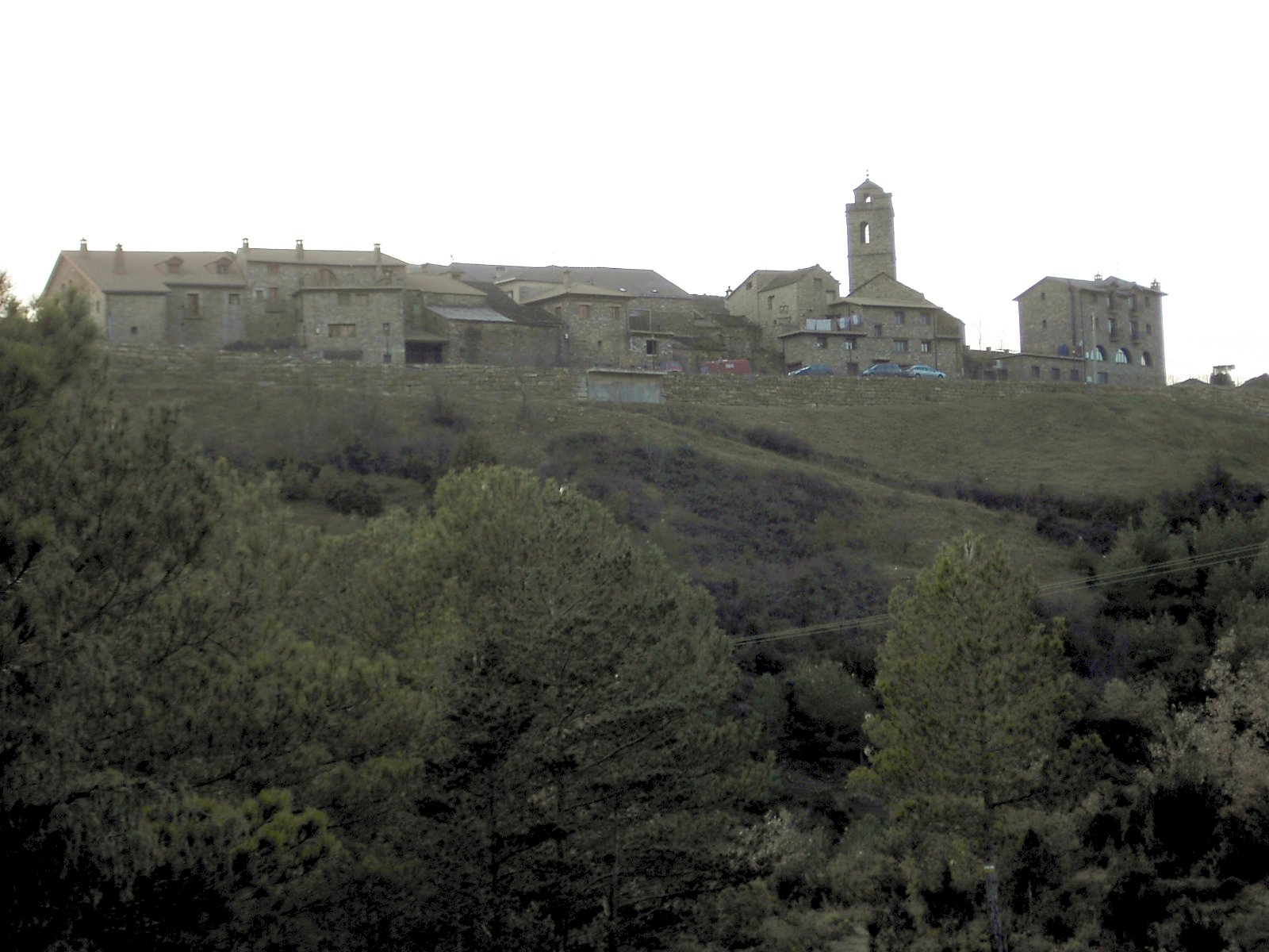 Vista general del núcleo de El Pueyo de Araguás, al anochecer.